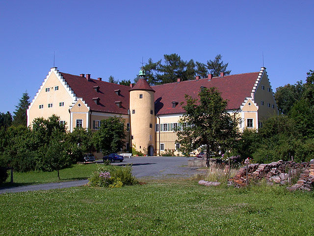 Das Röthenbacher Schloss